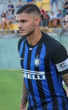 21.07.2018. Италия, Пиза. Третий «Газпром» — тренировочный сбор: товарищеский матч «Интер» — «Зенит».